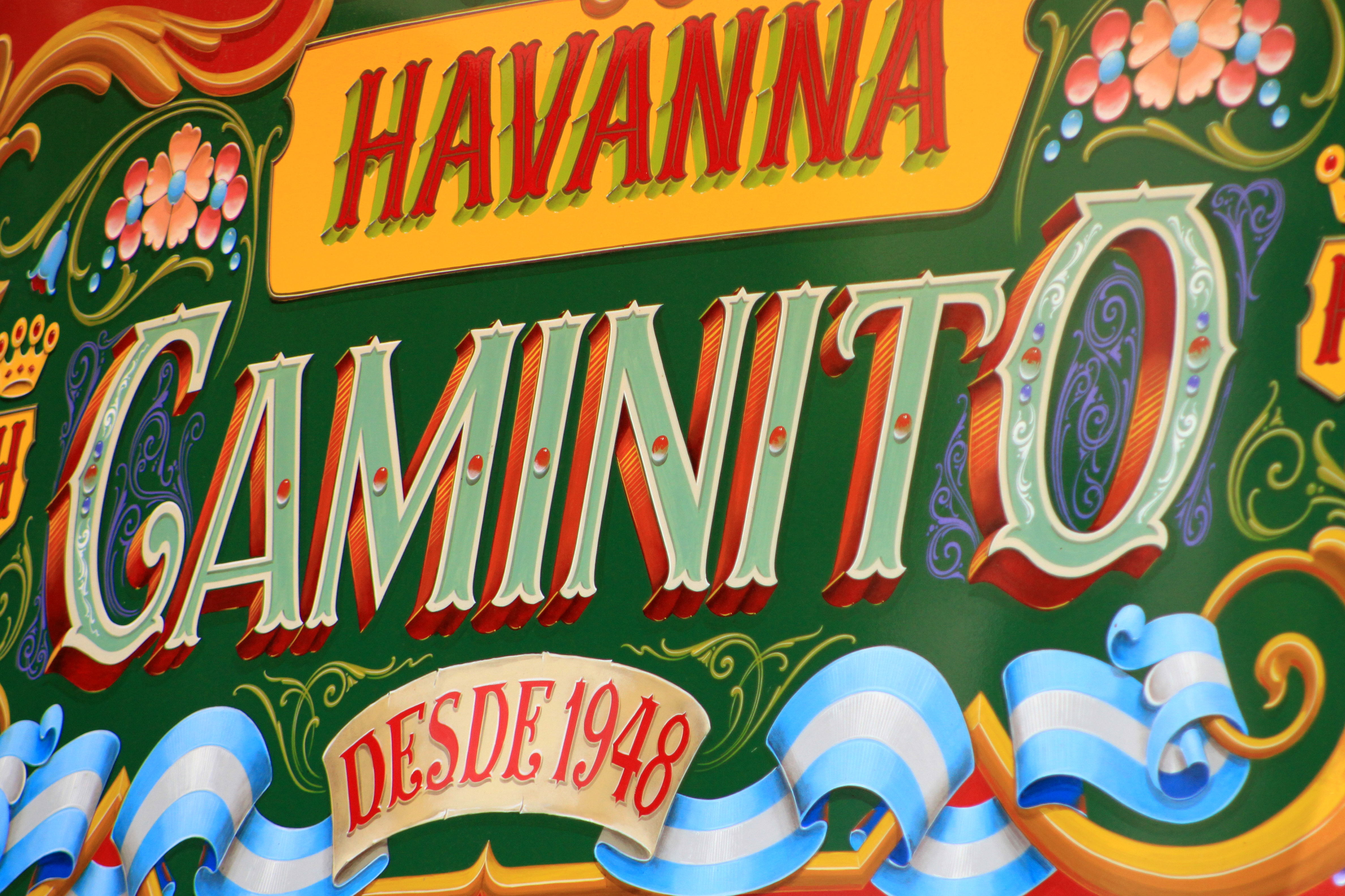 Havanna Store in Caminito, La Boca, Buenos Aires, Argentina.